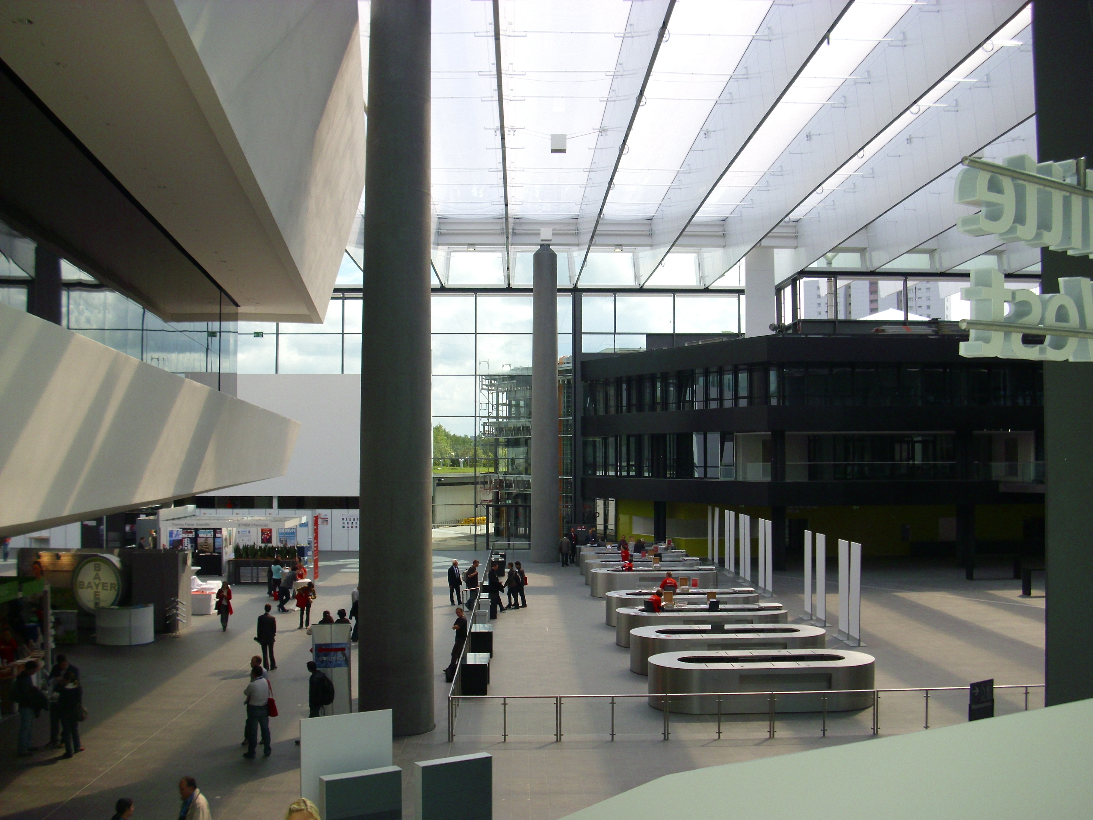 Messezentrum Nürnberg-Dutzendteich 28